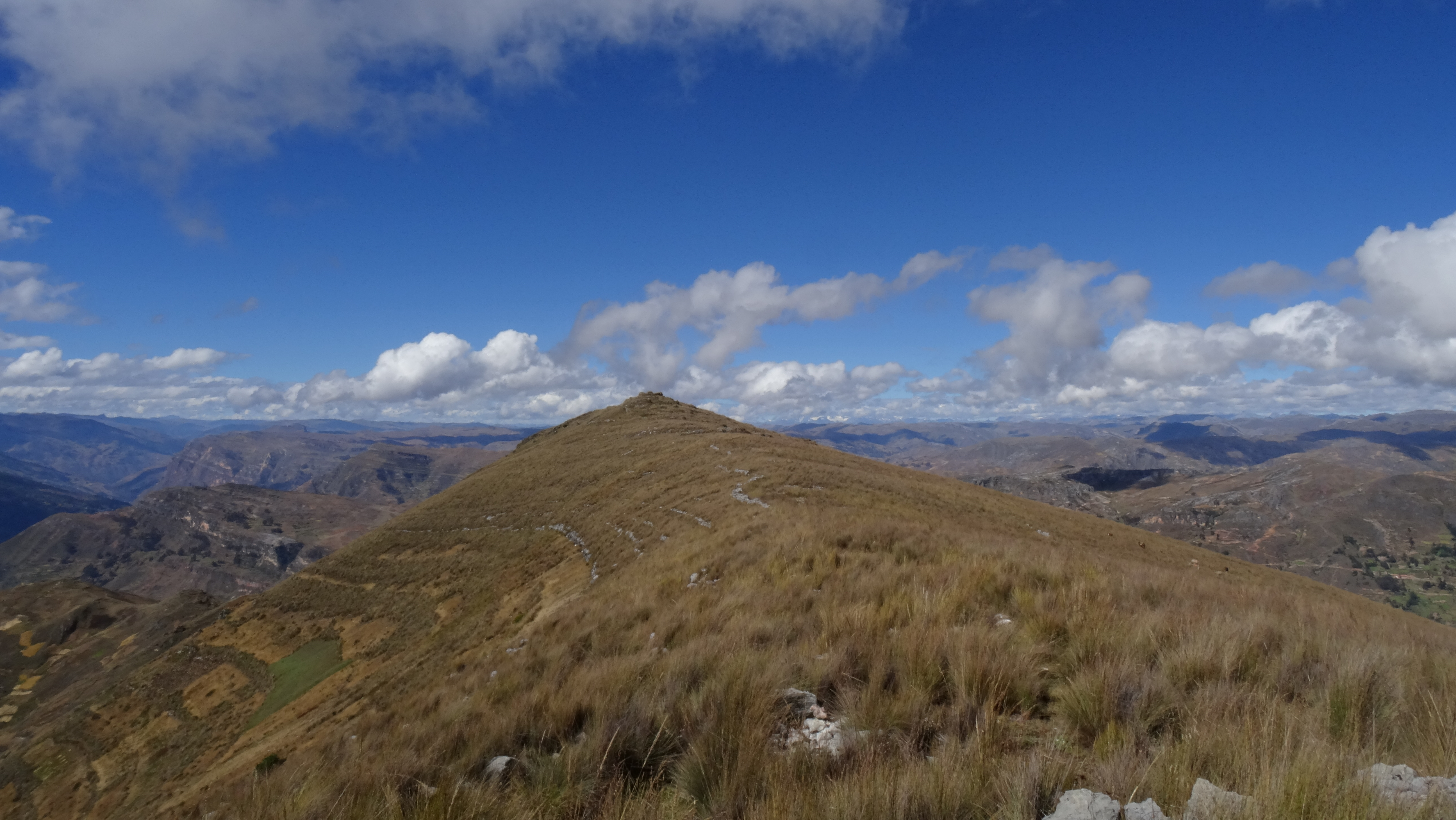 Cumbre alargada del cerro Auquipincush apuntando hacia el sureste.